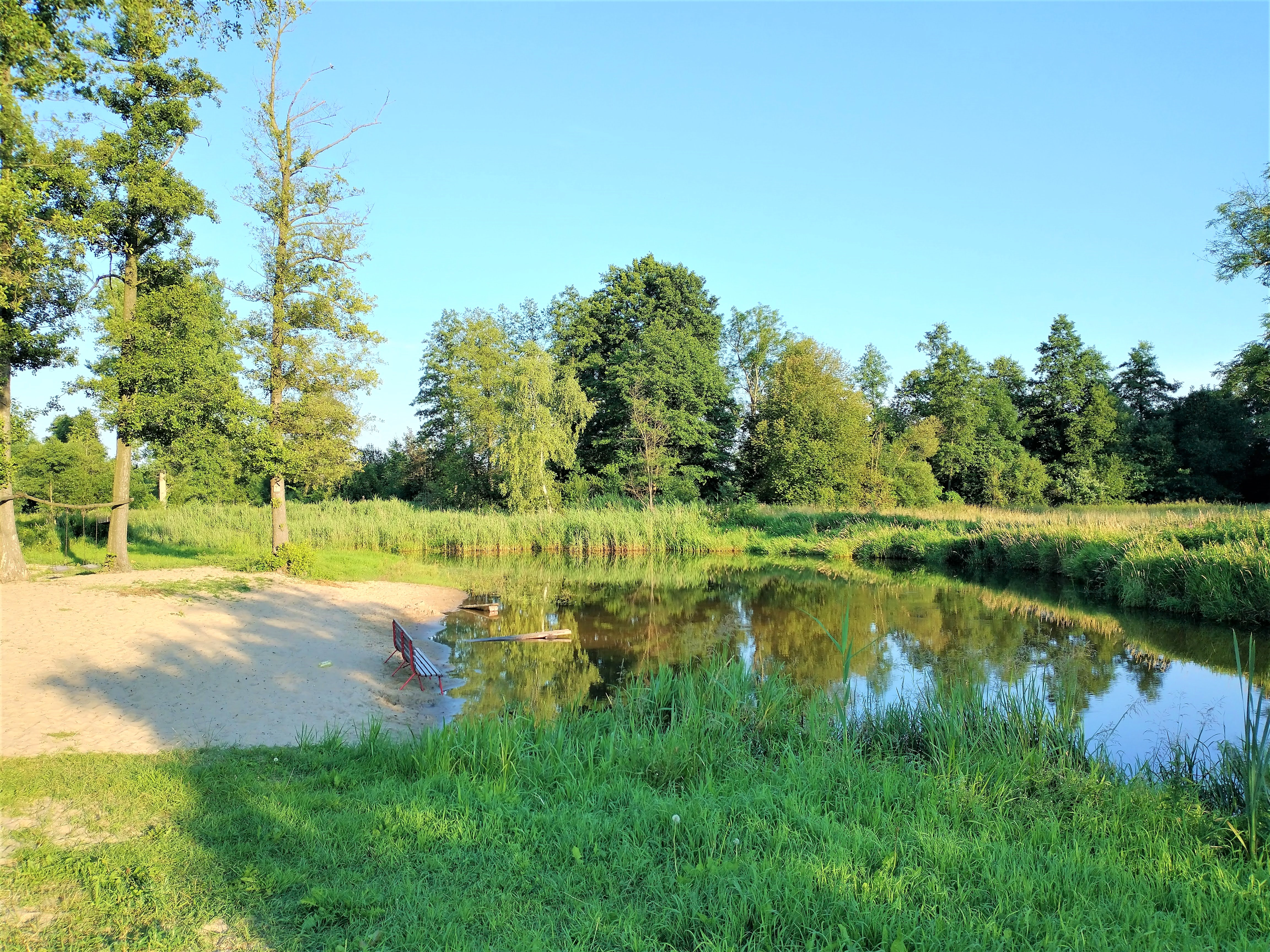 Turze na Mazowszu. Plaża nad Rządzą.